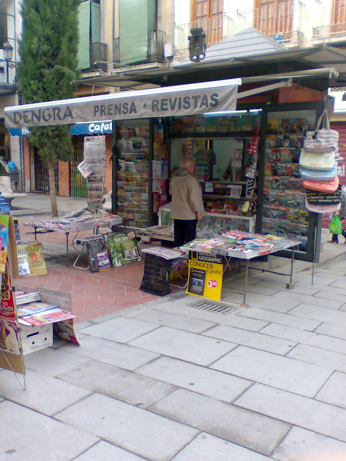 Kiosoco de prensa ubicada en la plaza Bibarambla